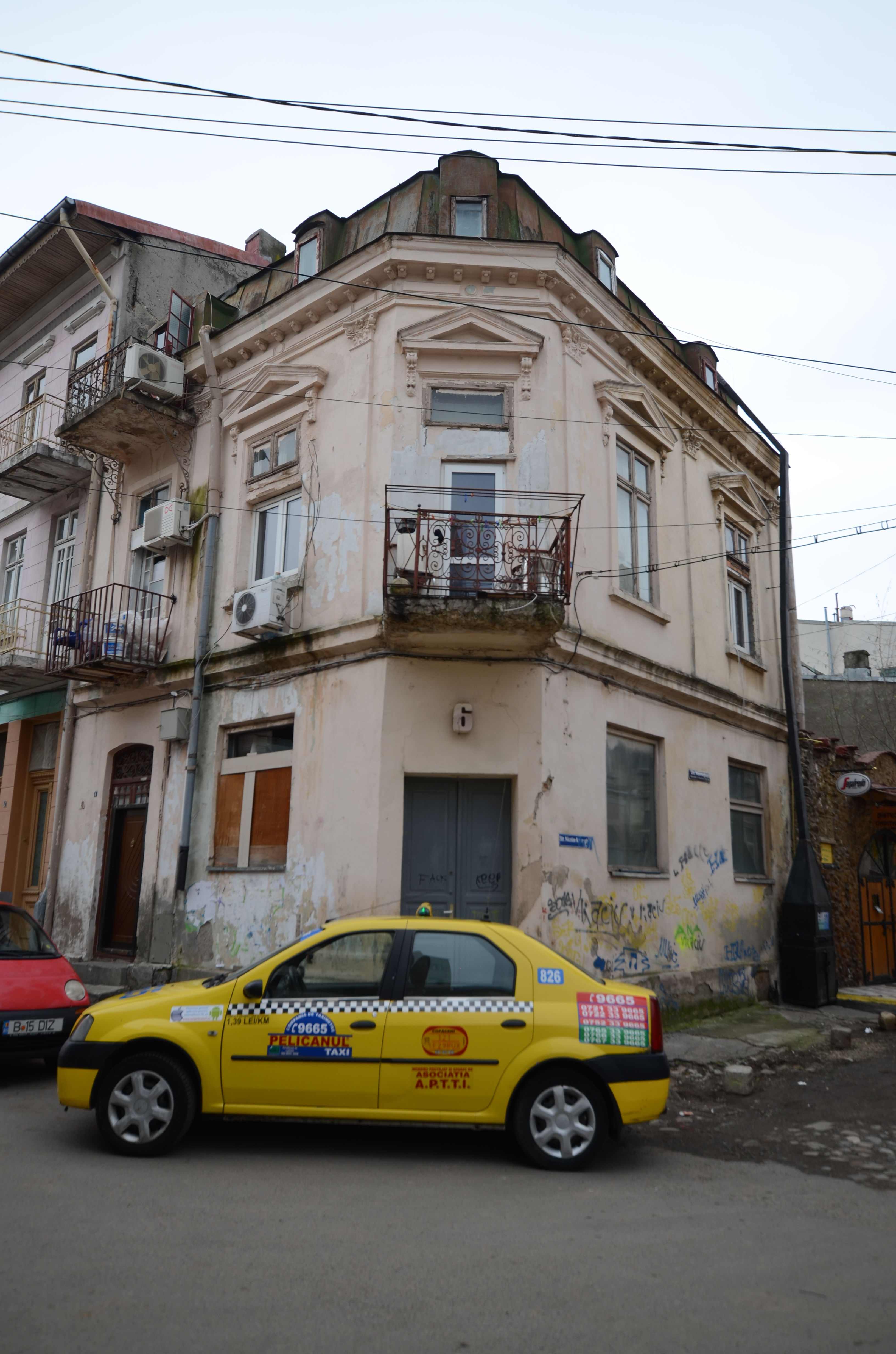 Casă, Str. Sarmizegetusa nr. 6, București